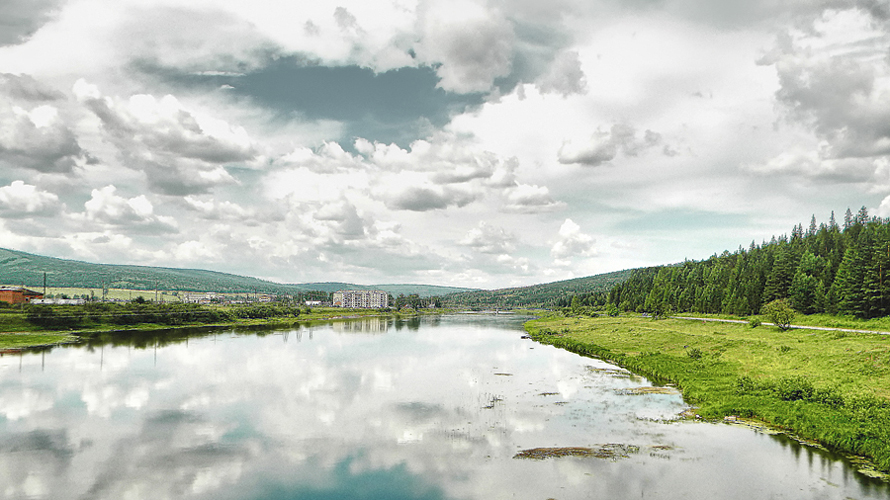 Вид на Курорт с моста.